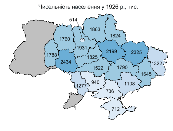 Населення регіонів України у 1926 р., тис. / Population of ukrainian regions in 1926